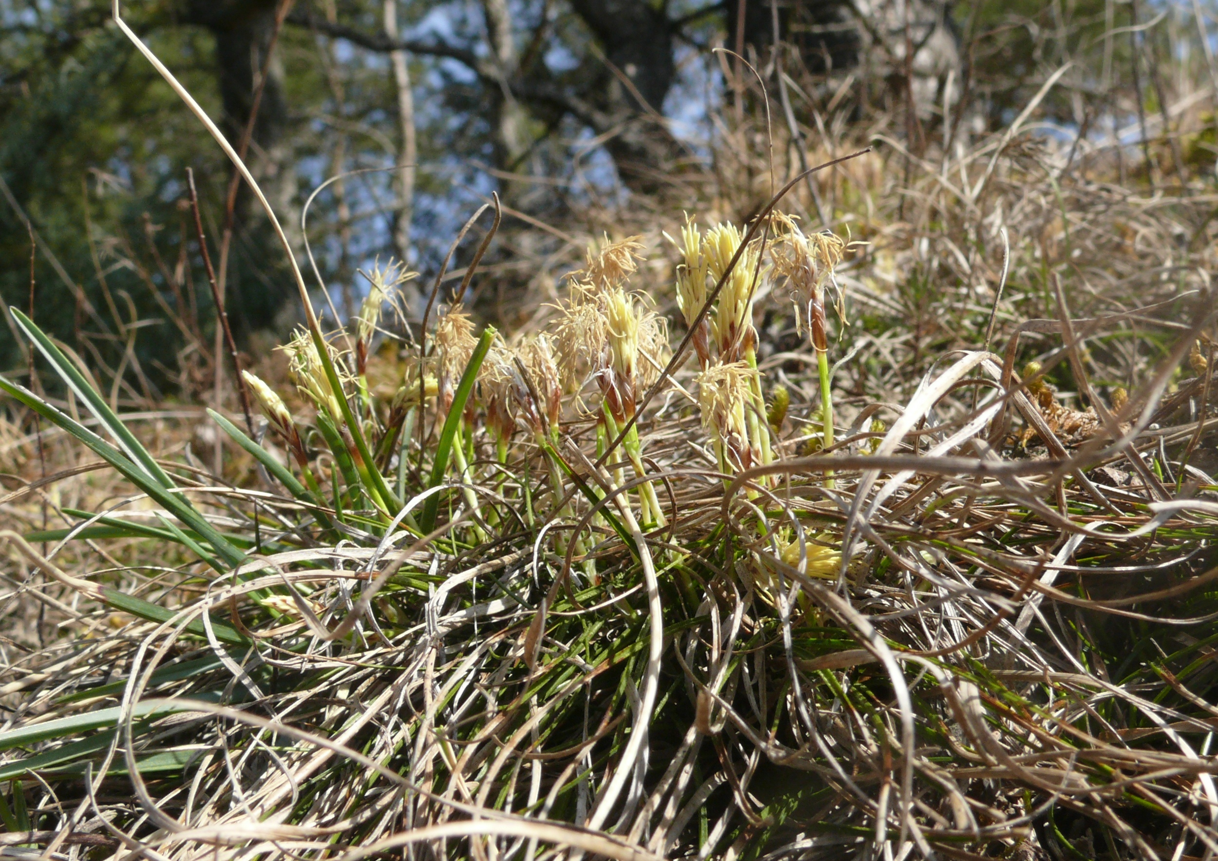 Carex humilis, Tauberland, Deutschland